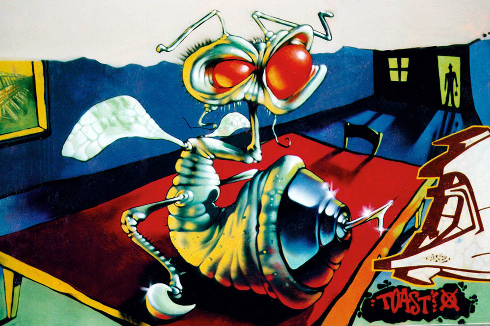 Colourinjection